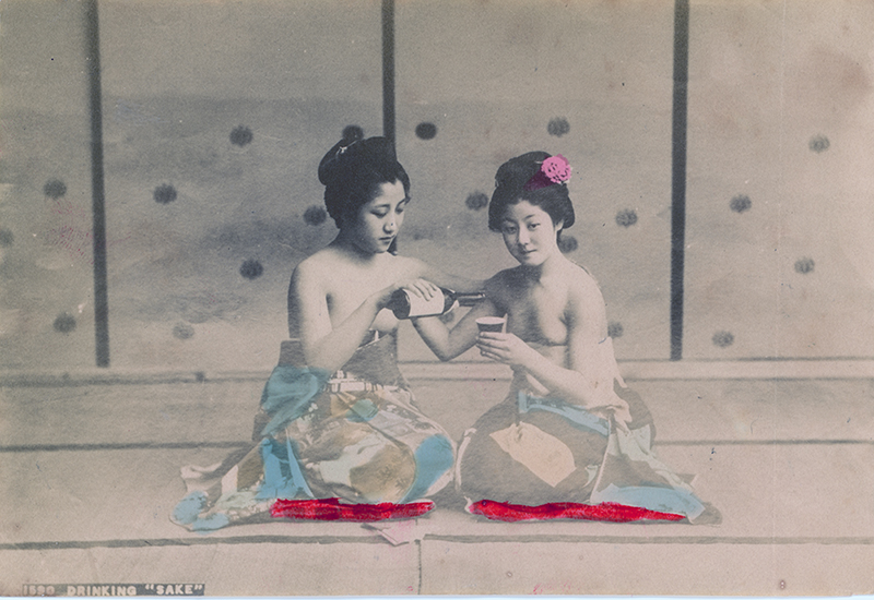 Deux femmes en train de boire du saké au XIXème siècle